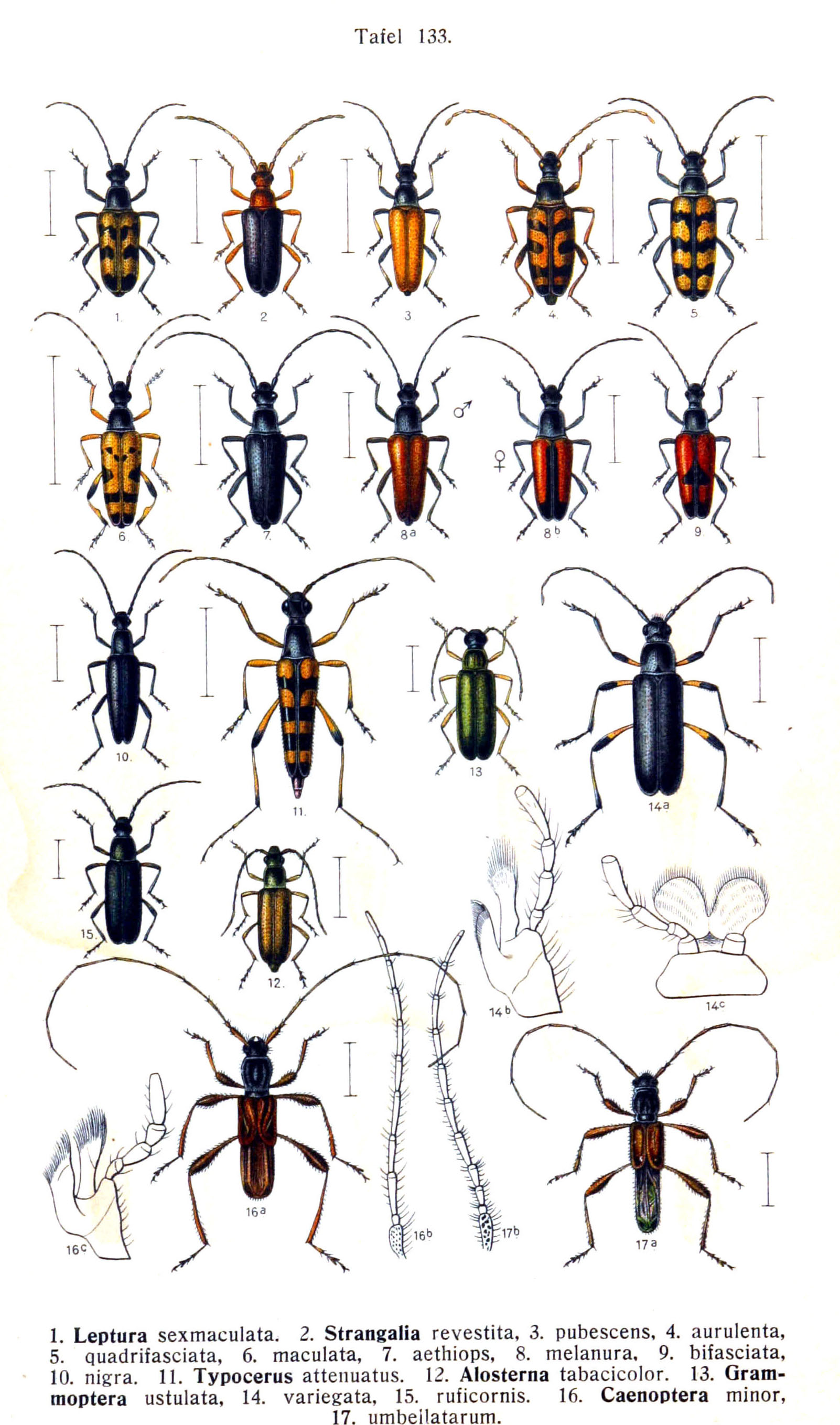 See image for index to numbers. Leptura sexmaculata Lin. = Judolia sexmaculata (Linnaeus, 1758), adult, dorsal view Strangalia revestita Lin. = Pedostrangalia revestita (Linnaeus, 1767), adult, dorsal view Strangalia pubescens Fabr. = Etorofus pubescens (Fabricius, 1787), adult, dorsal view Strangalia aurulenta Fabr. = Leptura aurulenta Fabricius, 1792, adult, dorsal view Strangalia quadrifasciata Lin. = Leptura quadrifasciata Linnaeus, 1758, adult, dorsal view Strangalia maculata Poda = Rutpela maculata (Poda, 1761), adult, dorsal view Strangalia aethiops Poda = Leptura aethiops Poda, 1761, adult, dorsal view Strangalia melanura Lin. = Stenurella melanura (Linnaeus, 1758) (8a: adult male, dorsal view, 8b: adult female, dorsal view) Strangalia bifasciata Müll. = Stenurella bifasciata (Müller, 1776), adult, dorsal view Strangalia nigra Lin. = Stenurella nigra (Linnaeus, 1758), adult, dorsal view Typocerus attenuatus Lin. = Strangalia attenuata (Linnaeus, 1758), adult, dorsal view Alosterna tabacicolor Deg. = Alosterna tabacicolor (De Geer, 1775), adult, dorsal view Grammoptera ustulata Schall. = Grammoptera ustulata (Schaller, 1783), adult, dorsal view Grammoptera variegata Germ. = Grammoptera abdominalis (Stephens, 1831) (14a: adult, dorsal view, 14b: maxilla, 14c: labium) Grammoptera ruficornis Fabr. = Grammoptera ruficornis (Fabricius, 1781), adult, dorsal view Caenoptera minor Lin. = Molorchus minor (Linnaeus, 1758) (16a: adult, dorsal view, 16b: antenna, 16c: maxilla) Caenoptera umbellatarum Schreiber = Glaphyra umbellatarum (Schreber, 1759) (17a: adult, dorsal view, 17b: antenna)